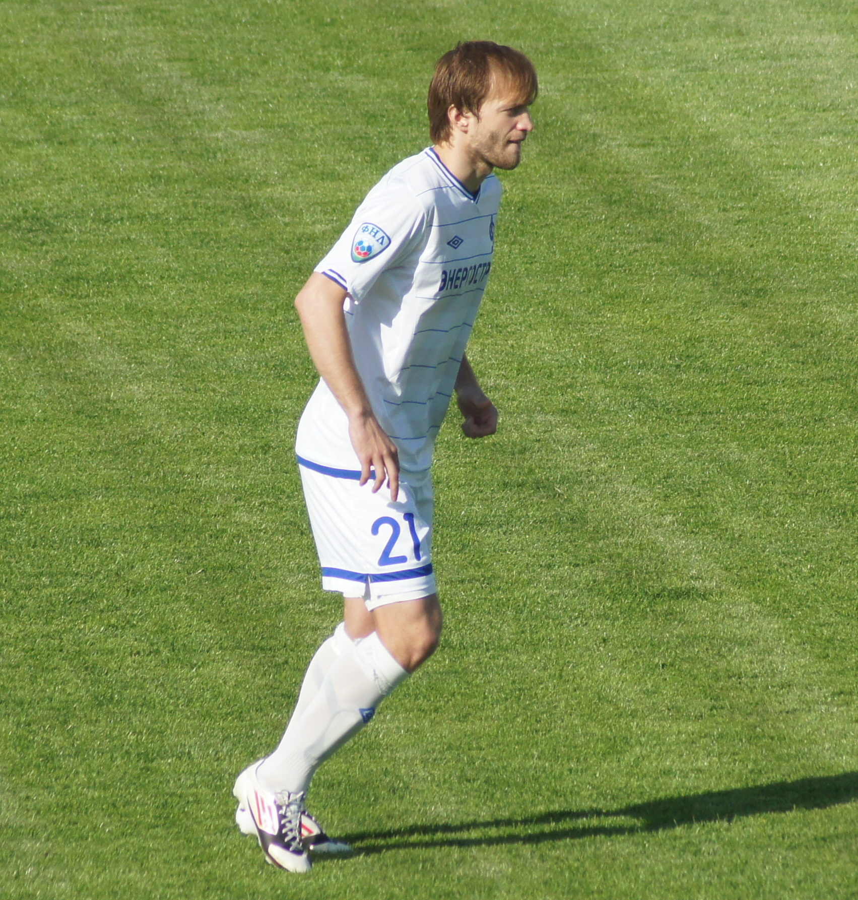 Артем Бекетов в Динамо (Брянск), 2012 г.